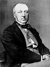 Portrait of Gaston d'Audiffret-Pasquier